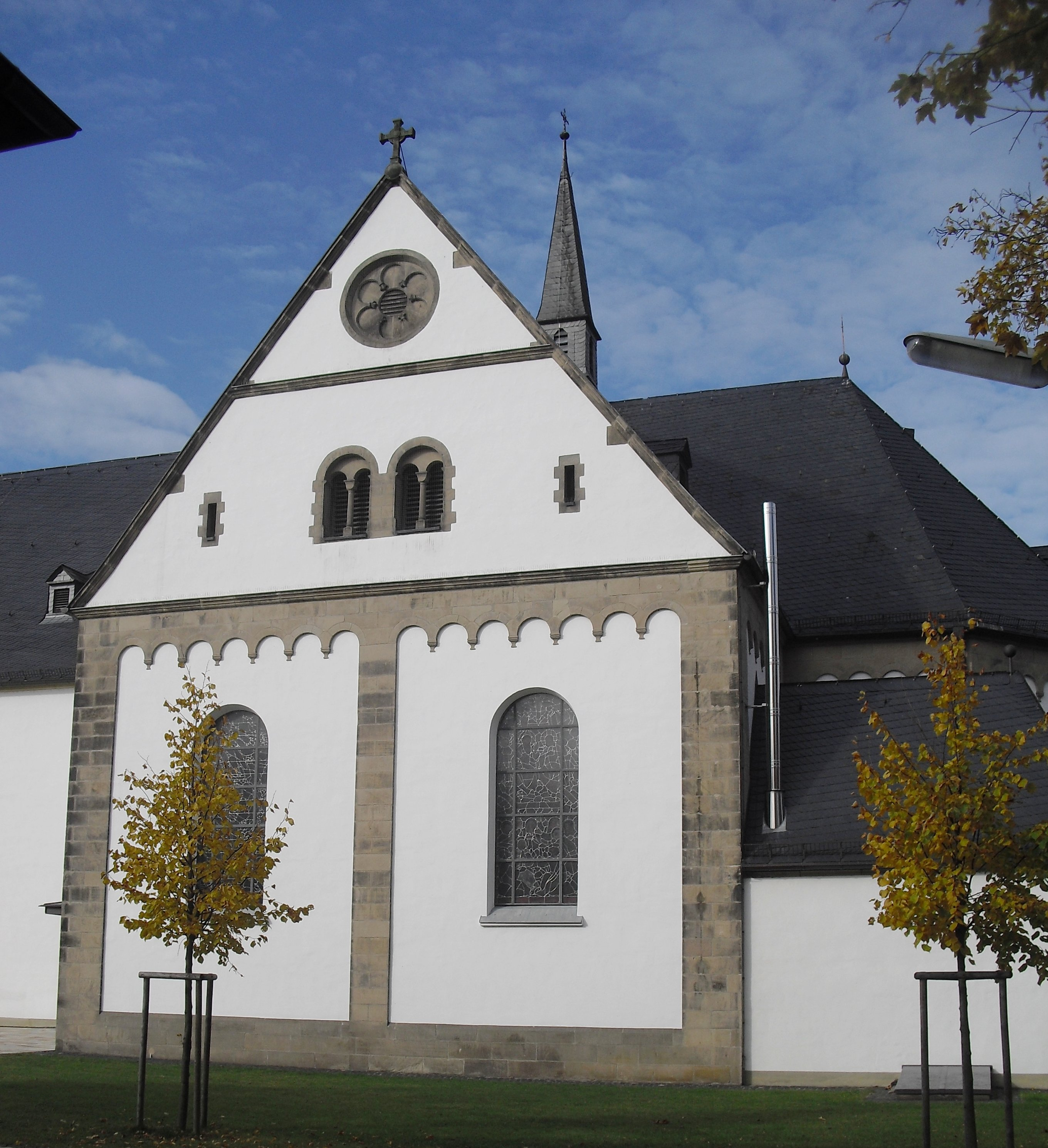 Kirche in Kaunitz